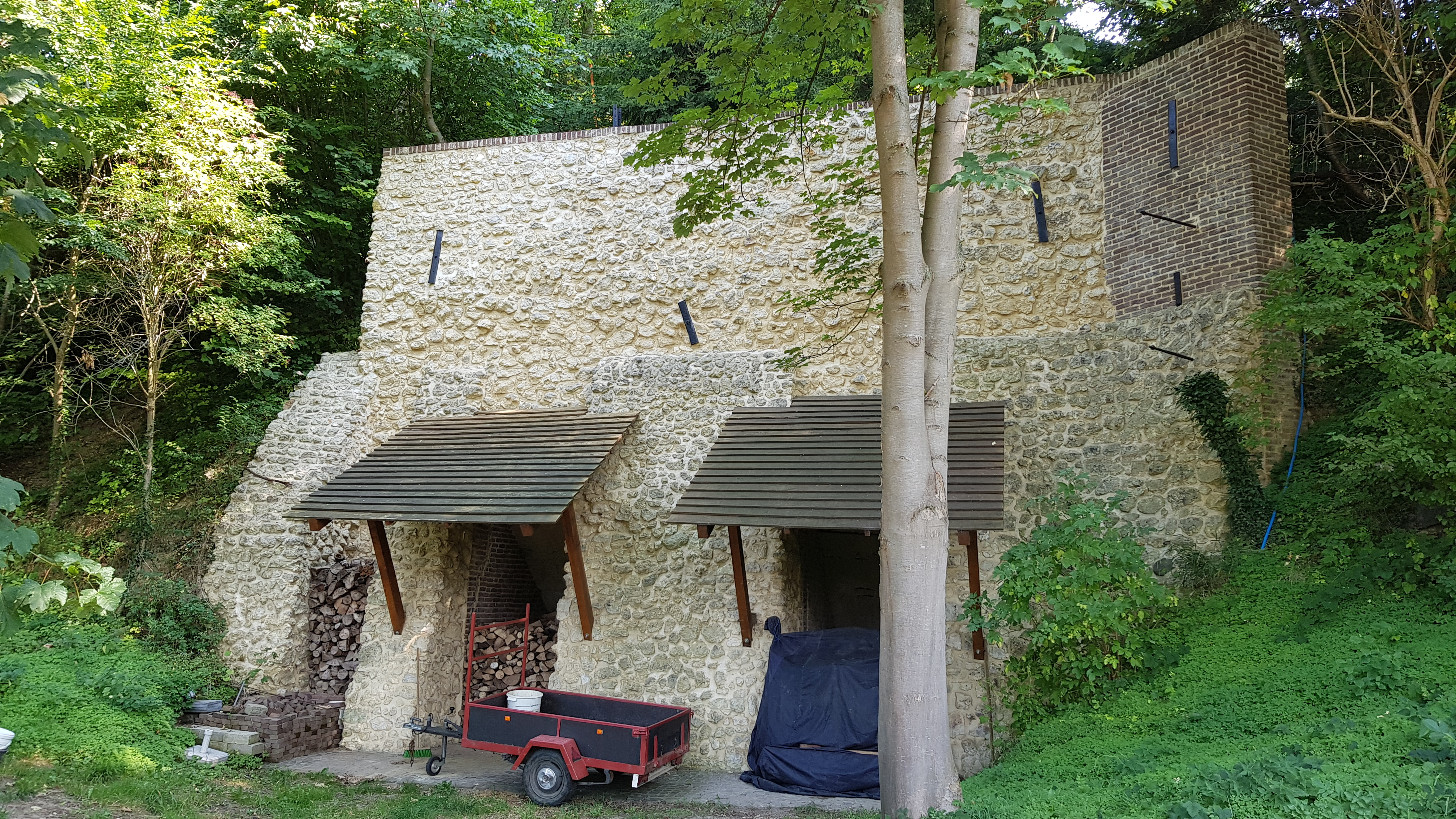 Kalkoven Winthagen, Winthagen, Nederland